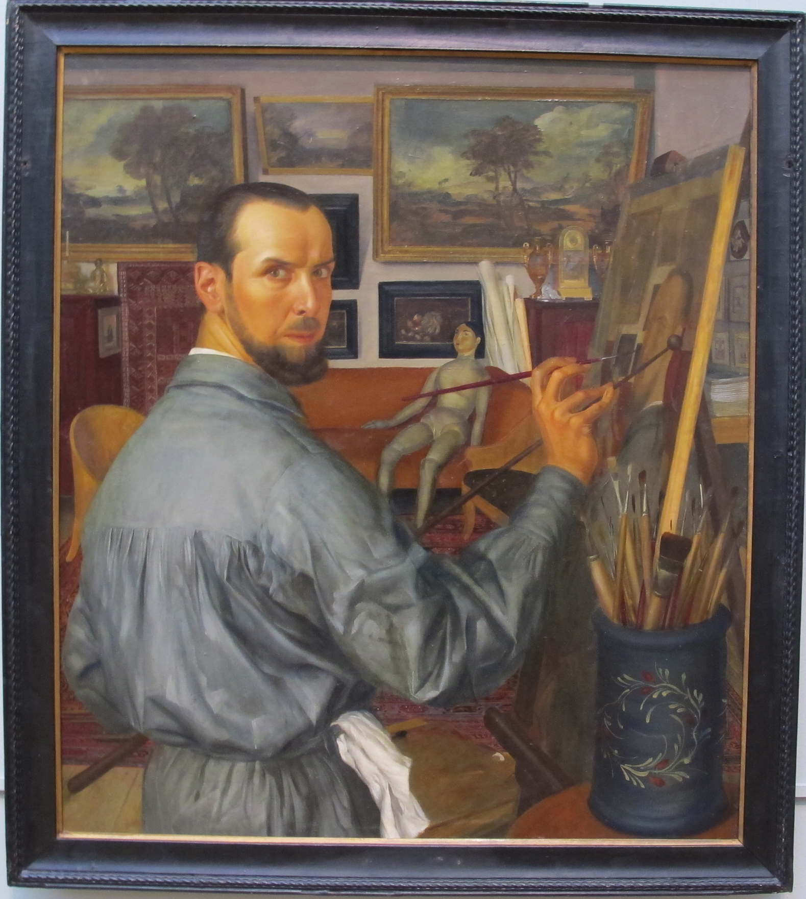 Alexander yakovlev, autoritratto, 1917